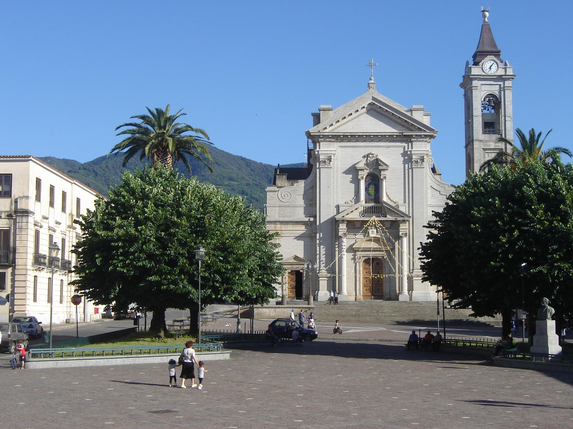 Prospetto della facciata della Cattedrale di Oppido Mametina foto scattata da piazza Umberto primo